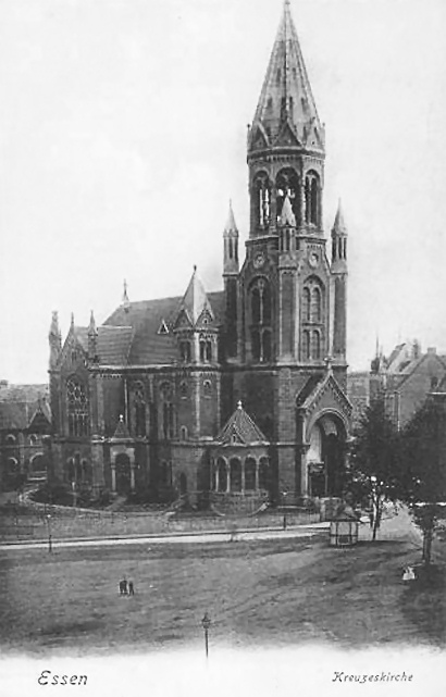 alte Kreuzeskirche in Essen